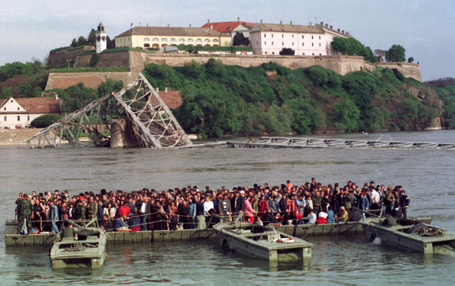 Нато бомбардовање СР Југославија 1999.године. НАТО бомбардери порушили су четири новосадска моста на Дунаву па су грађани морали скелама да прелазе Дунав